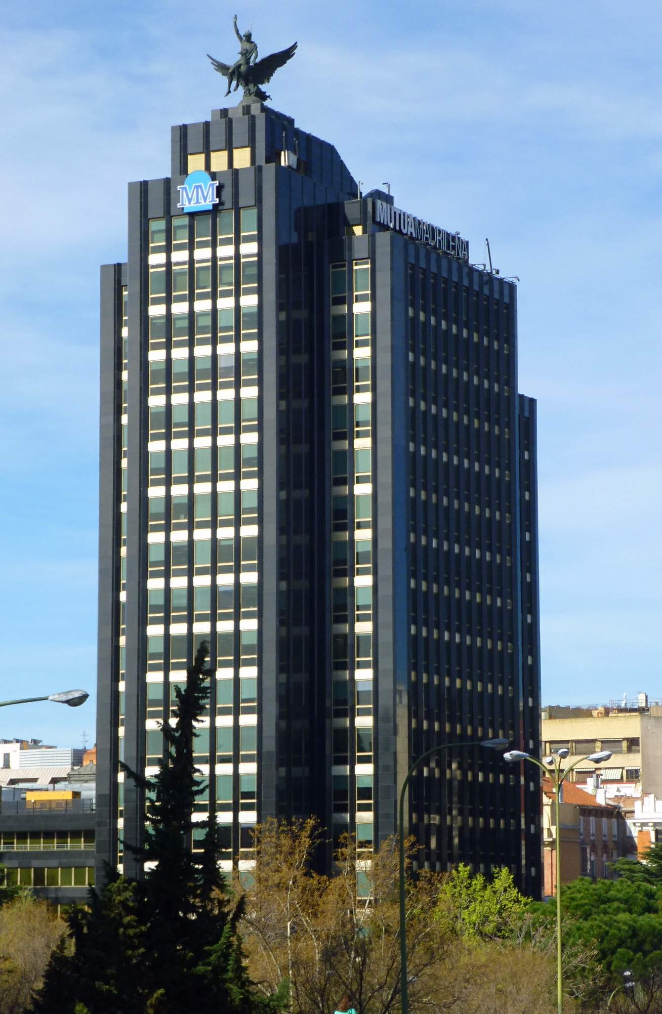 Edificio Castellana 33 (Mutua Madrileña), en Madrid